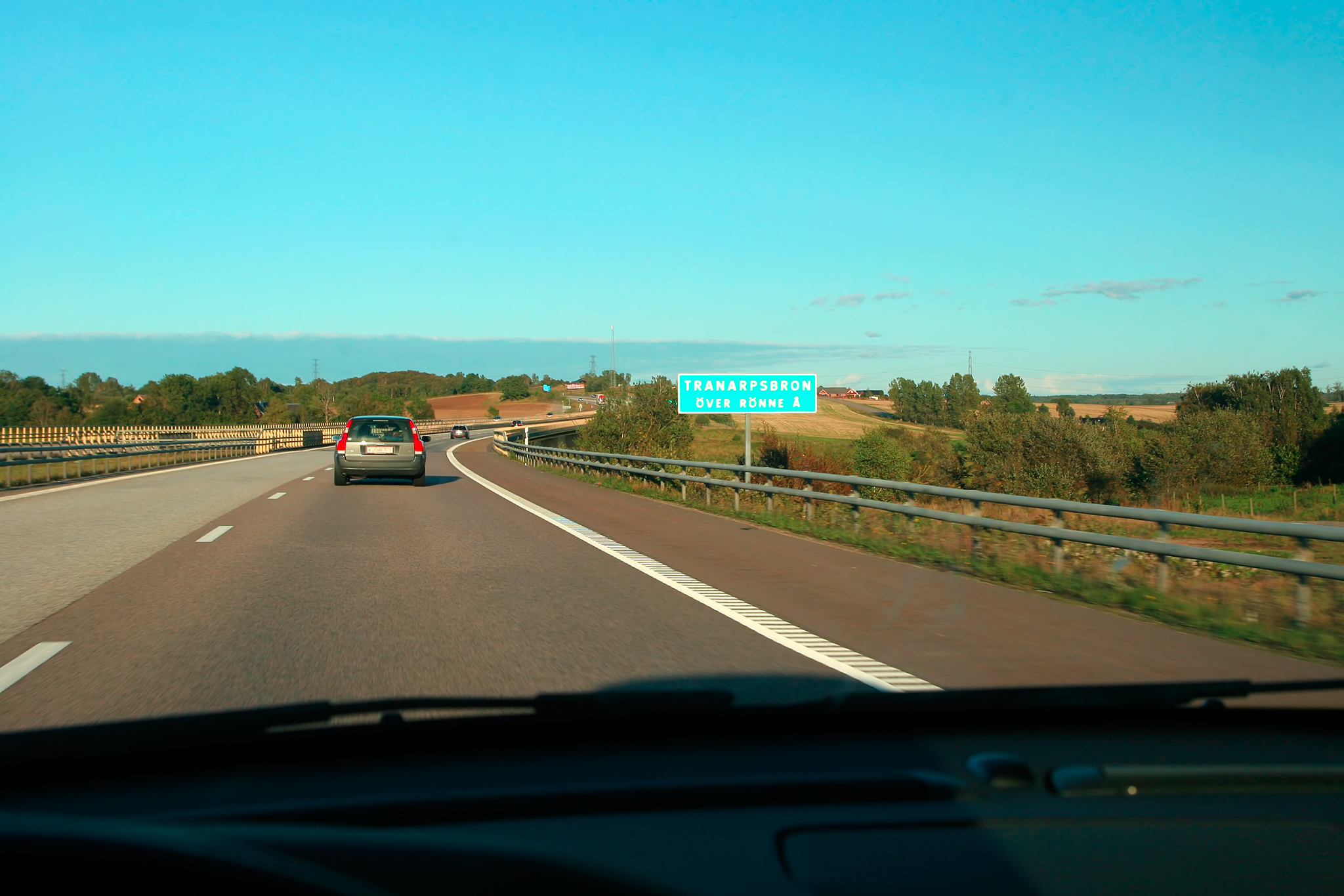 Tranarpsbron (E4 mot norr)